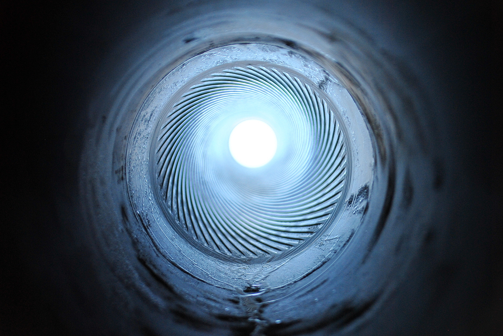 Нарезной ствол пушки. (предположительно 152мм Д-20)